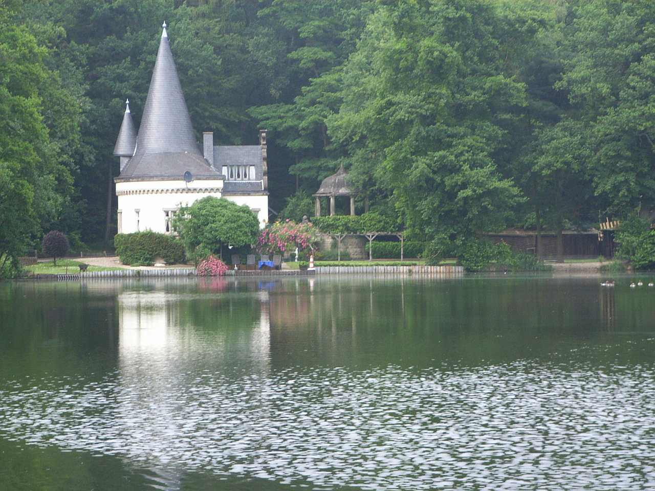 Raky Weiher mit Torhaus der früheren Raky-Villa, Dalheim-Rödgen